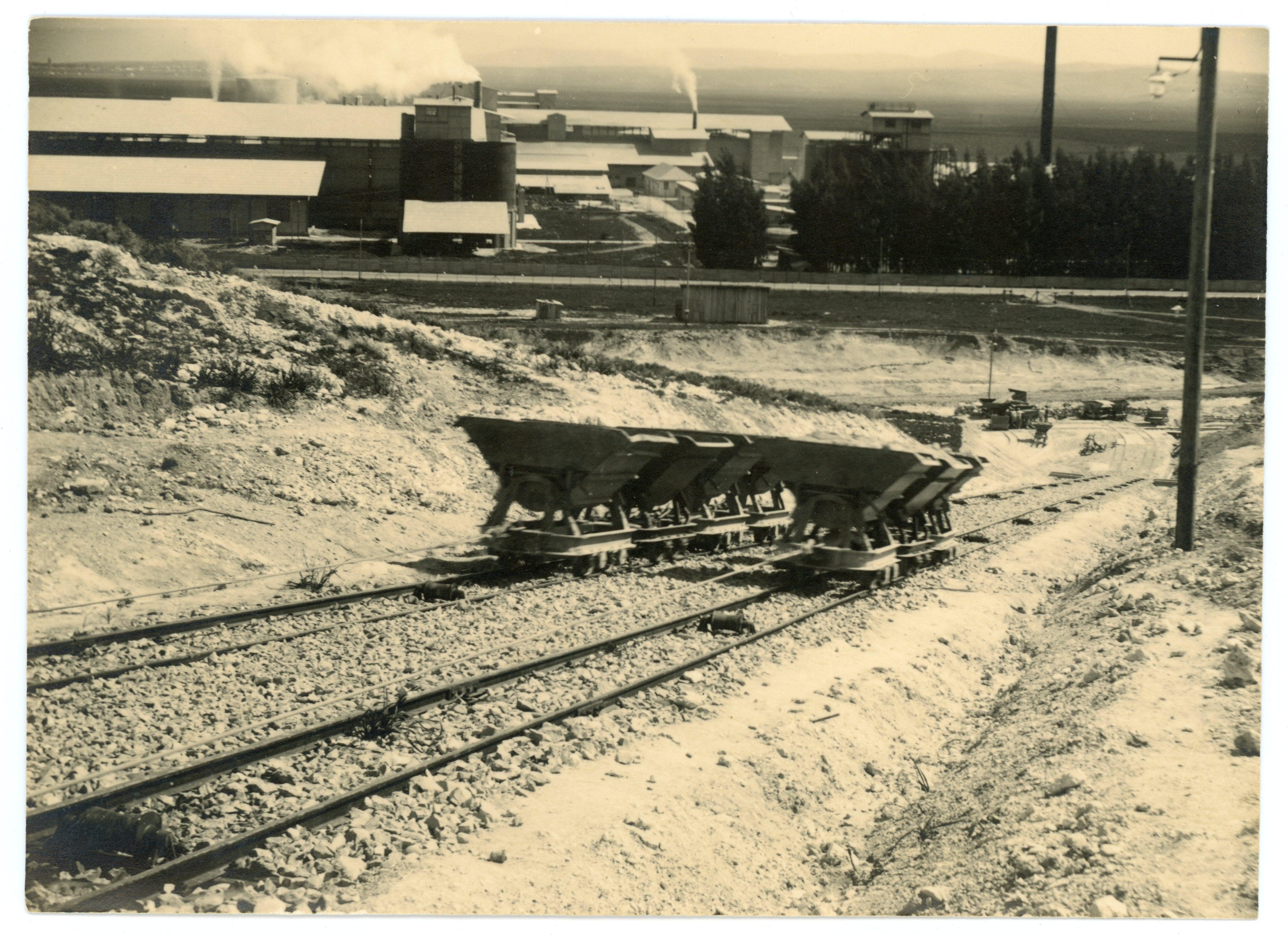 מחצבת נשר הישנה. המחצבה הוקמה במקביל להקמת בית החרושת שבנייתו החלה בספטמבר 1923 והסתיימה באוקטובר 1925. המחצבה פעלה במשך שנים, עד שחומר הגלם התדלדל והוחלט לפתח מחצבה חדשה באזור החרייבה במעלה הר הכרמל בקרבת גבעת ההגנה של היום